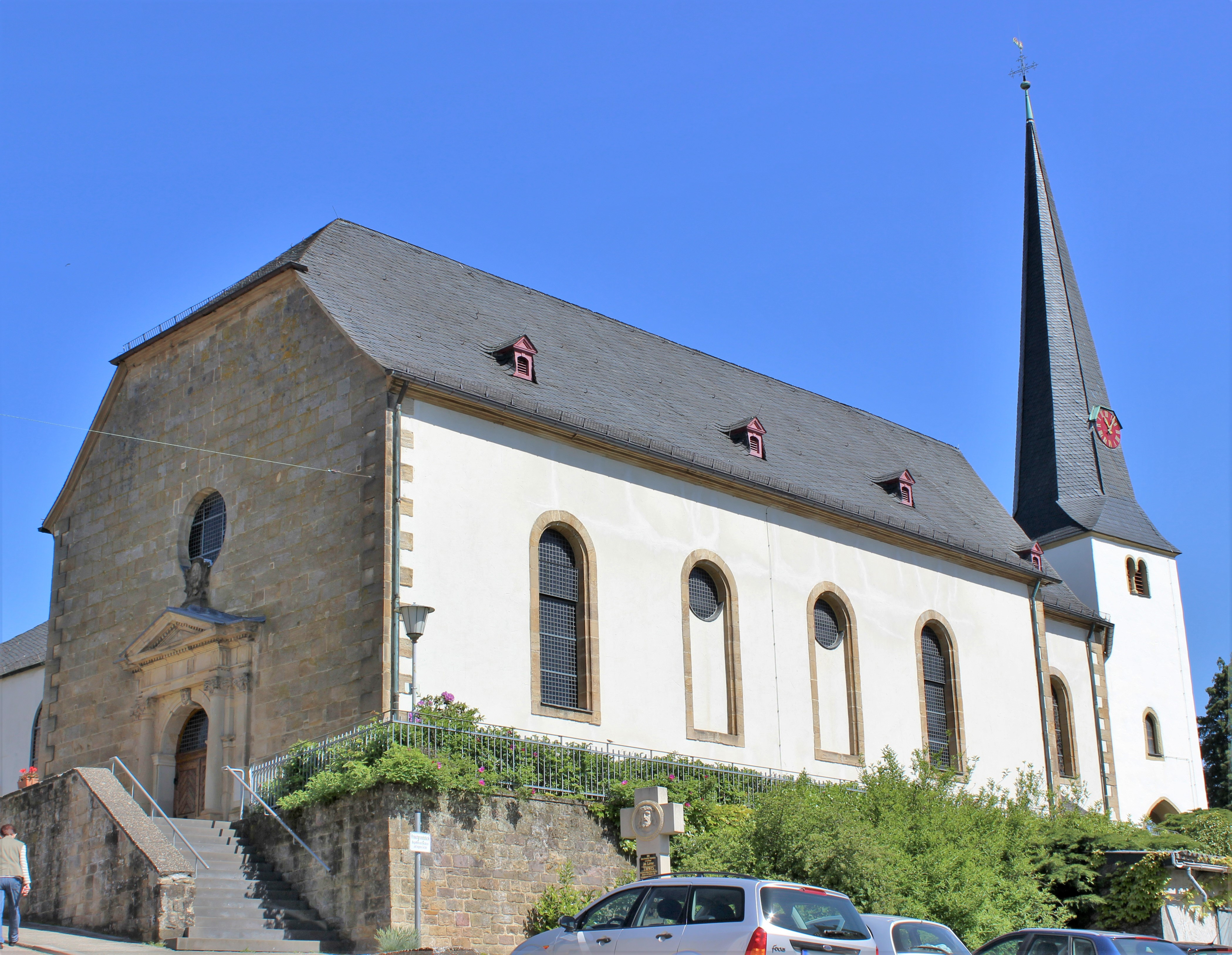 Die katholische Pfarrkirche St. Alban in Thalexweiler, einem Stadtteil von Lebach, Landkreis Saarlouis, Saarland